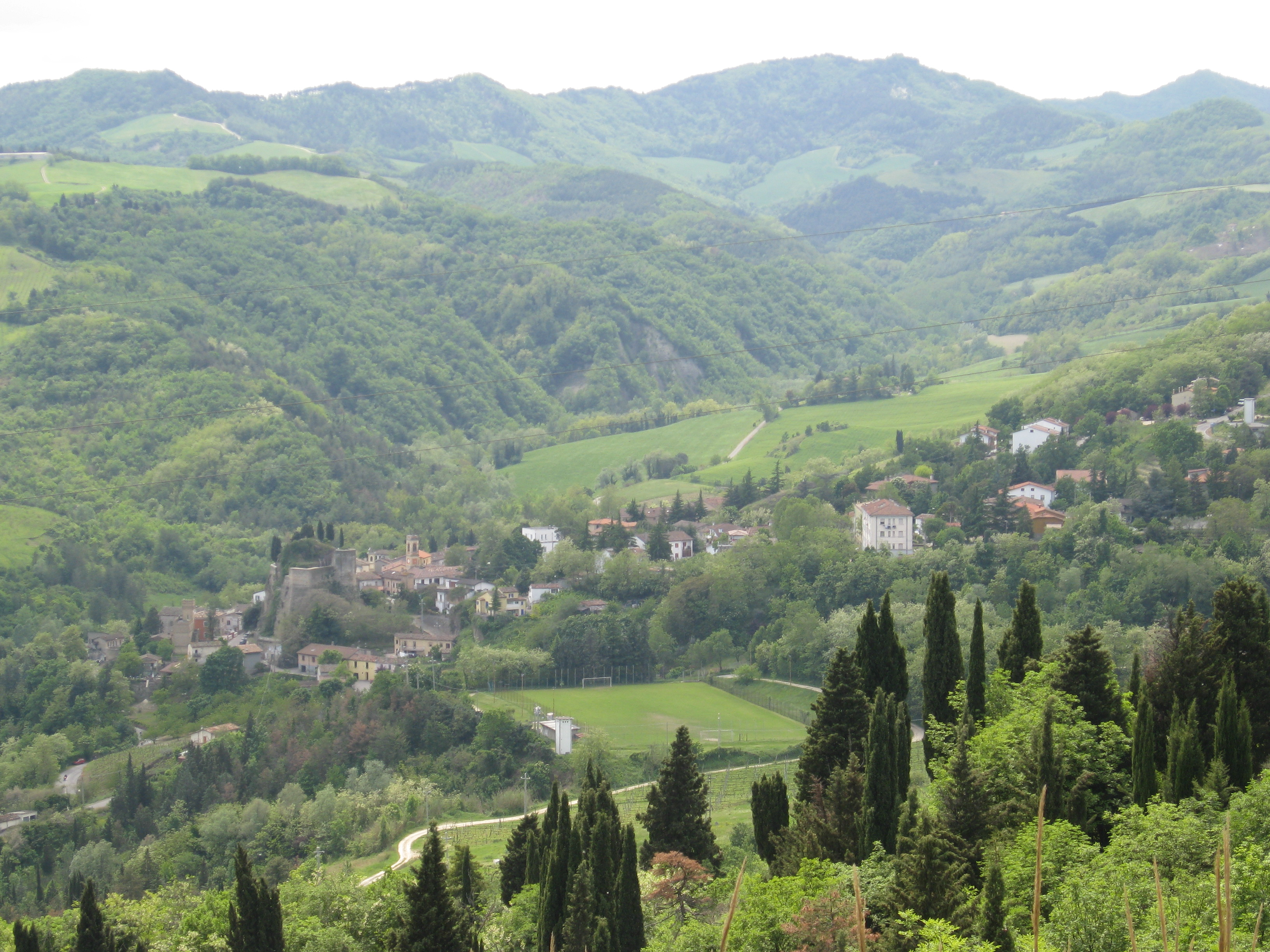 Predappio Alta, panorama.